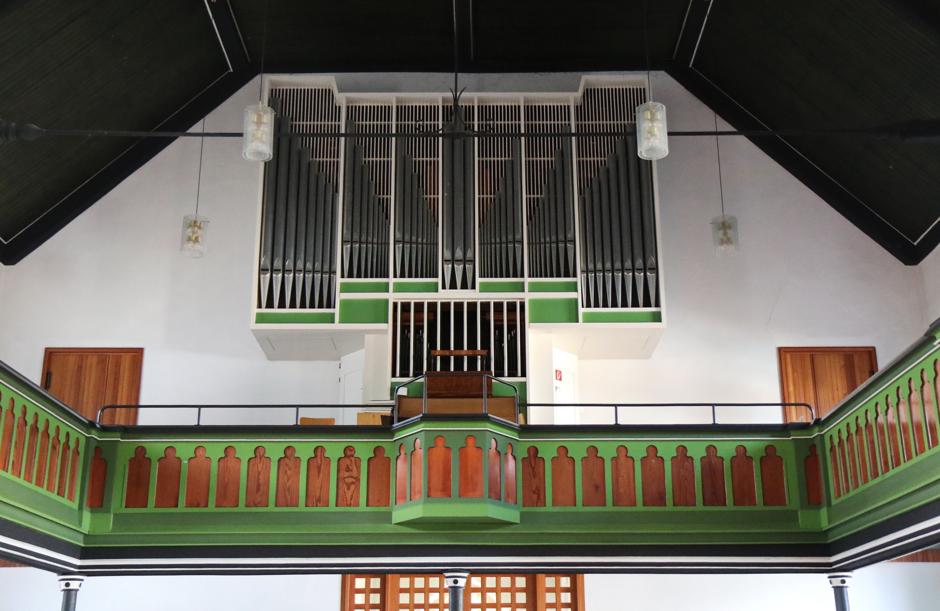 Schuke-Orgel (op. 469) in der Erlöserkirche in Schalksmühle, Worthstraße 2.